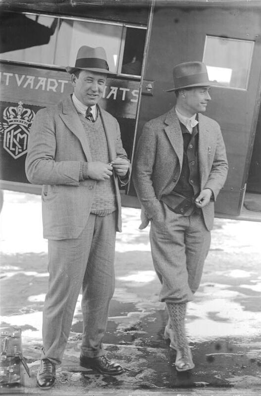 Die beiden berühmten holländischen Indienflieger Smirnoff und Ahler in Berlin! Die beiden berühmten holländischen Indienflieger Smirnoff (links) und Ahler (rechts) nach ihrer Landung auf dem Centralflughafen in Berlin. Sie steuerten das erste Verkehrsflugzeug der holländischen Luft-Verkehrs-Gesellschaft London-Rotterdam-Berlin.